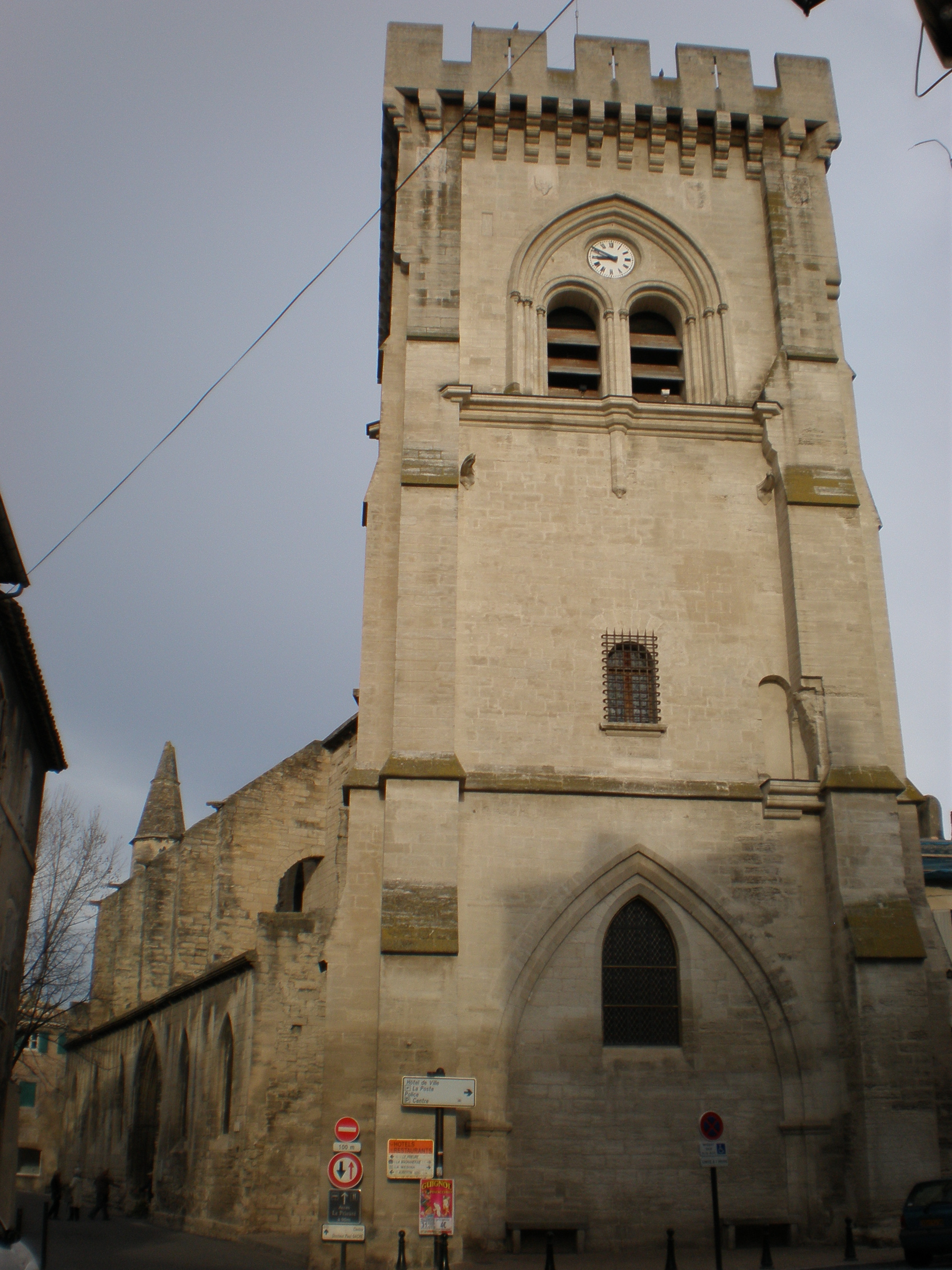 La collégiale Notre-Dame de Villeneuve-lès-Avignon (Gard)